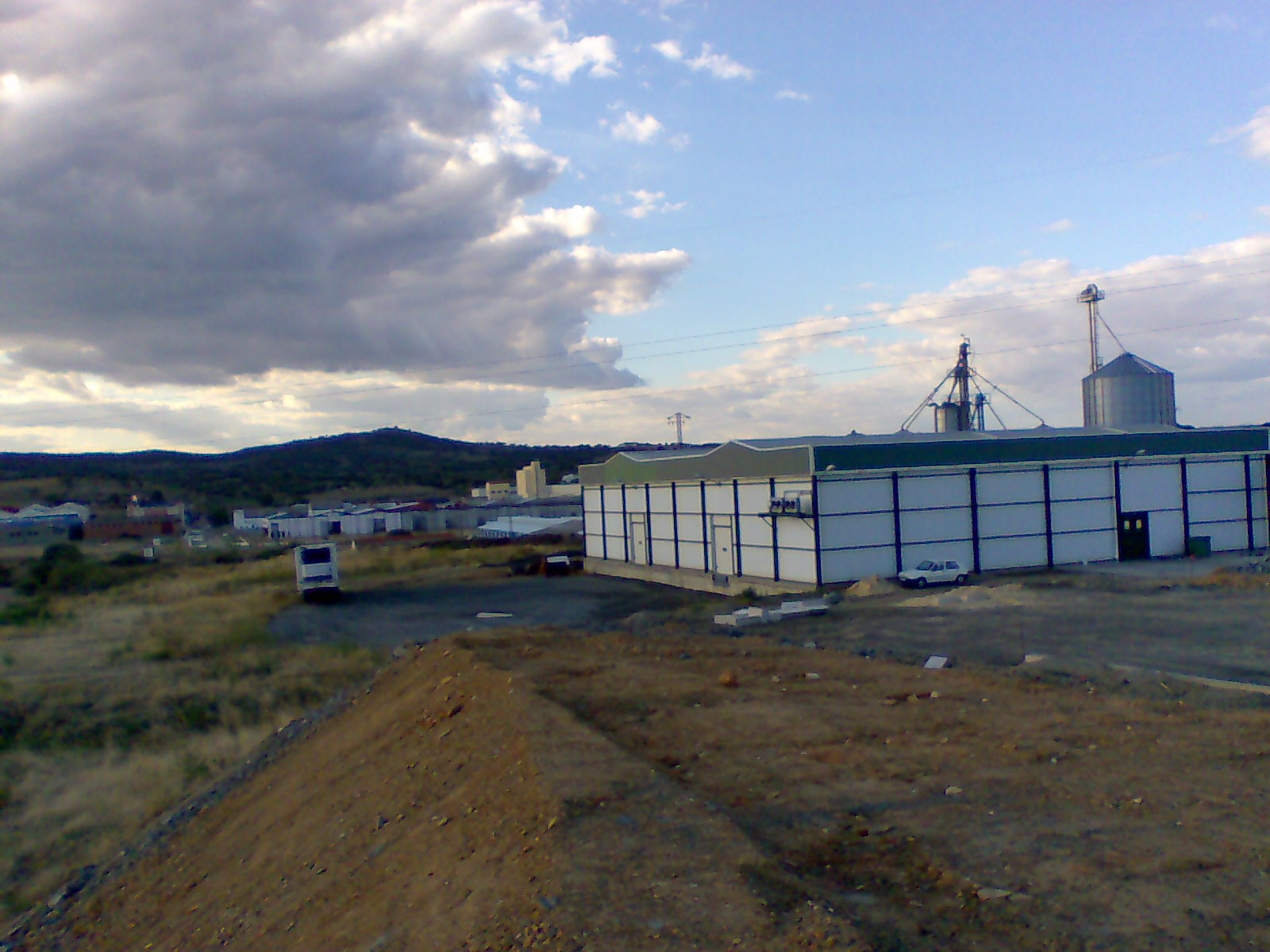 Polígono Industrial de Plasencia Cáceres